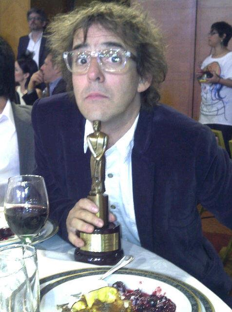 Ganador del Martín Fierro, mejor labor humorística.